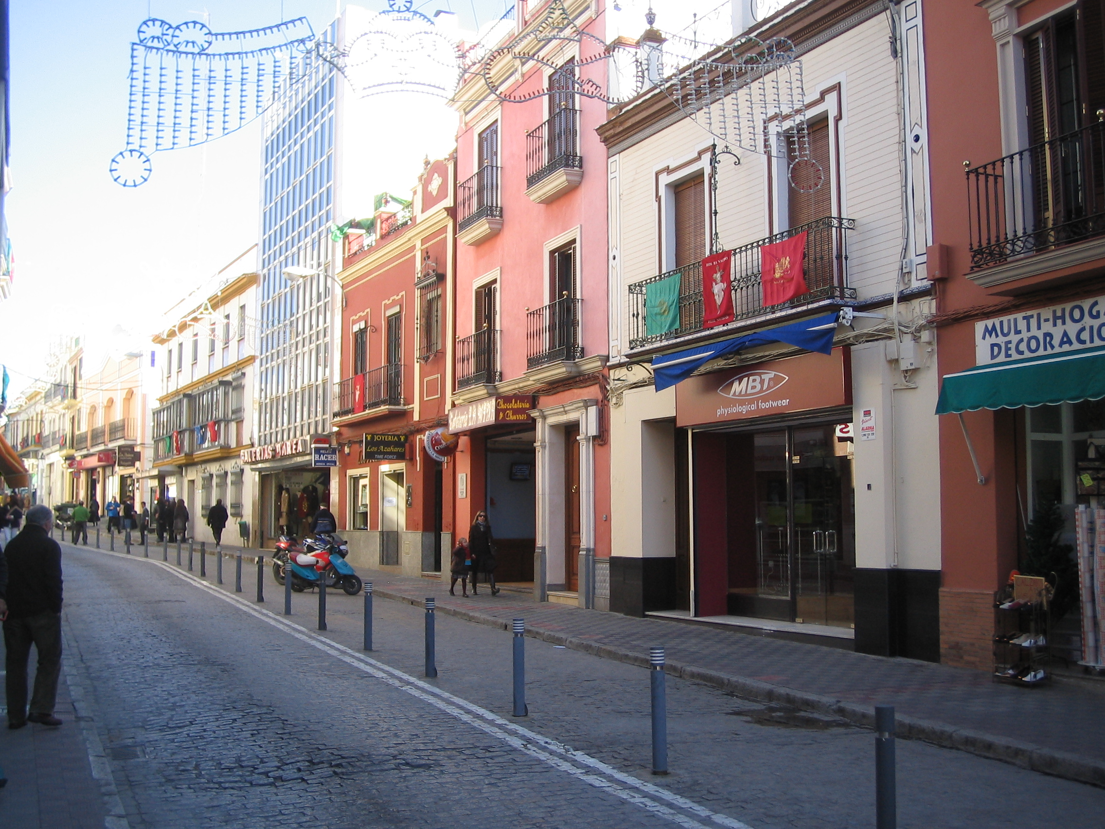 Calle La Mina en Alcalá de Guadaíra, Sevilla, España.